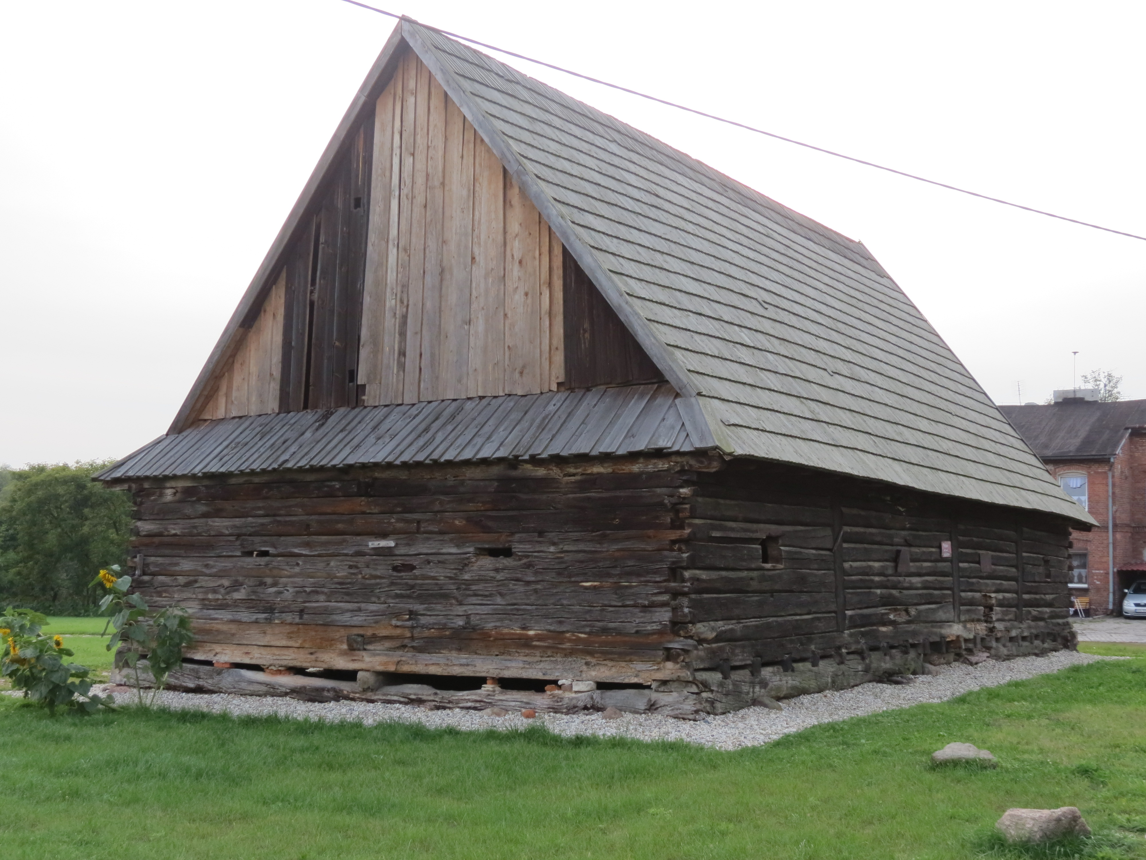 Rachowice - spichlerz dworski z 1 poł. XVII w., drewniany